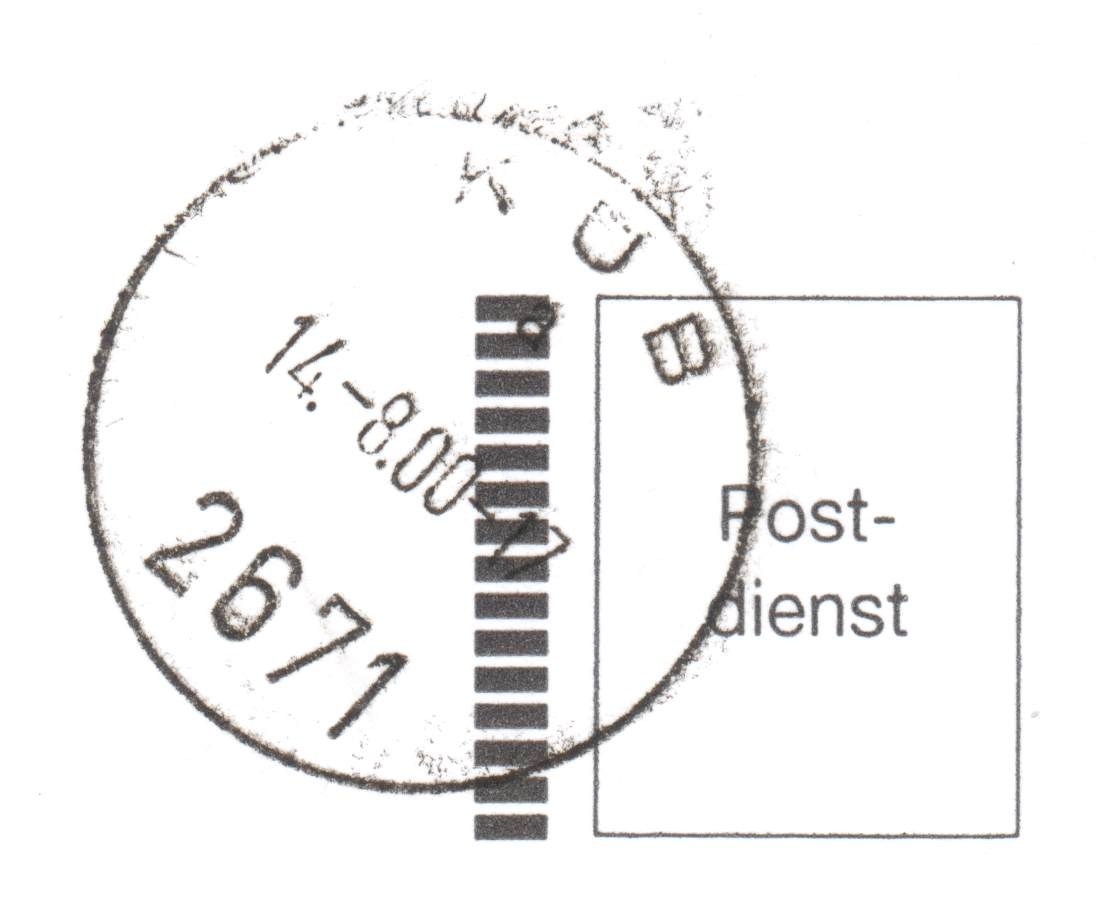 Poststempel vom 14. August 2000 der historischen Postfiliale 2671 Küb